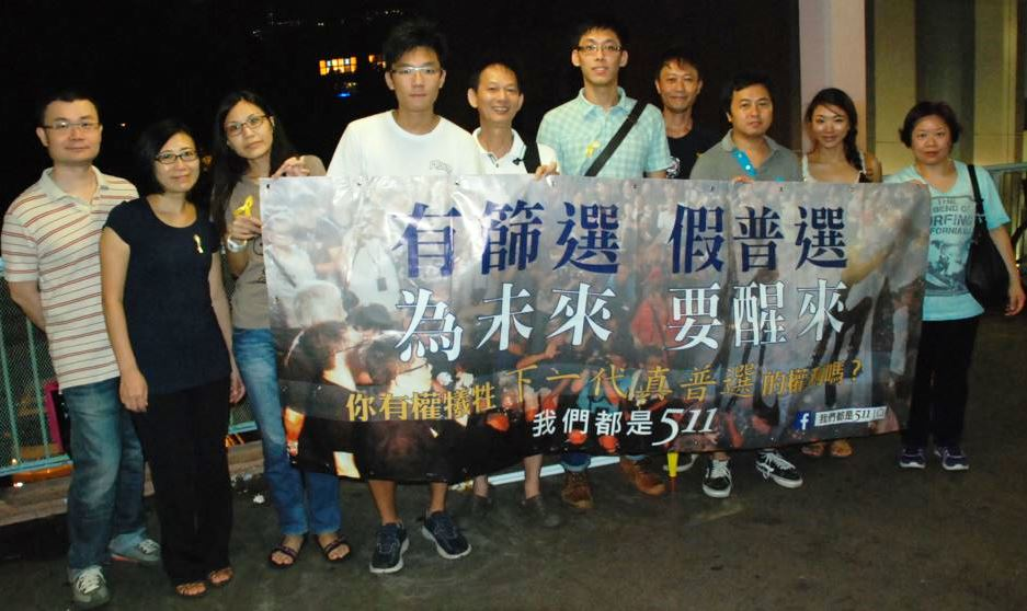 中文（台灣）: 「我們都是511」成員Cherrie(右二)表示，不希望香港成為中國假普選的橋頭堡